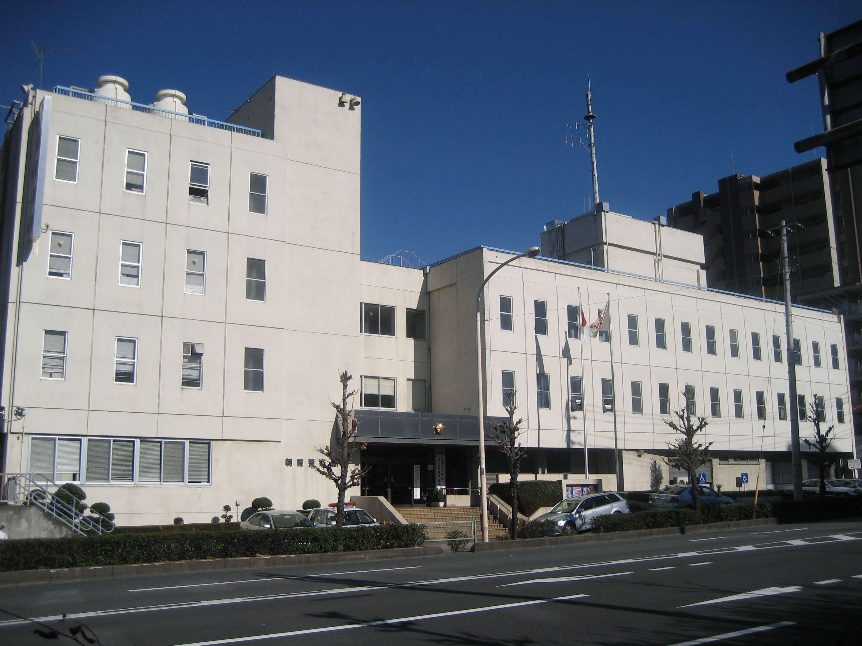 朝霞警察署庁舎